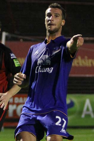 Apostolos Vellios of Everton